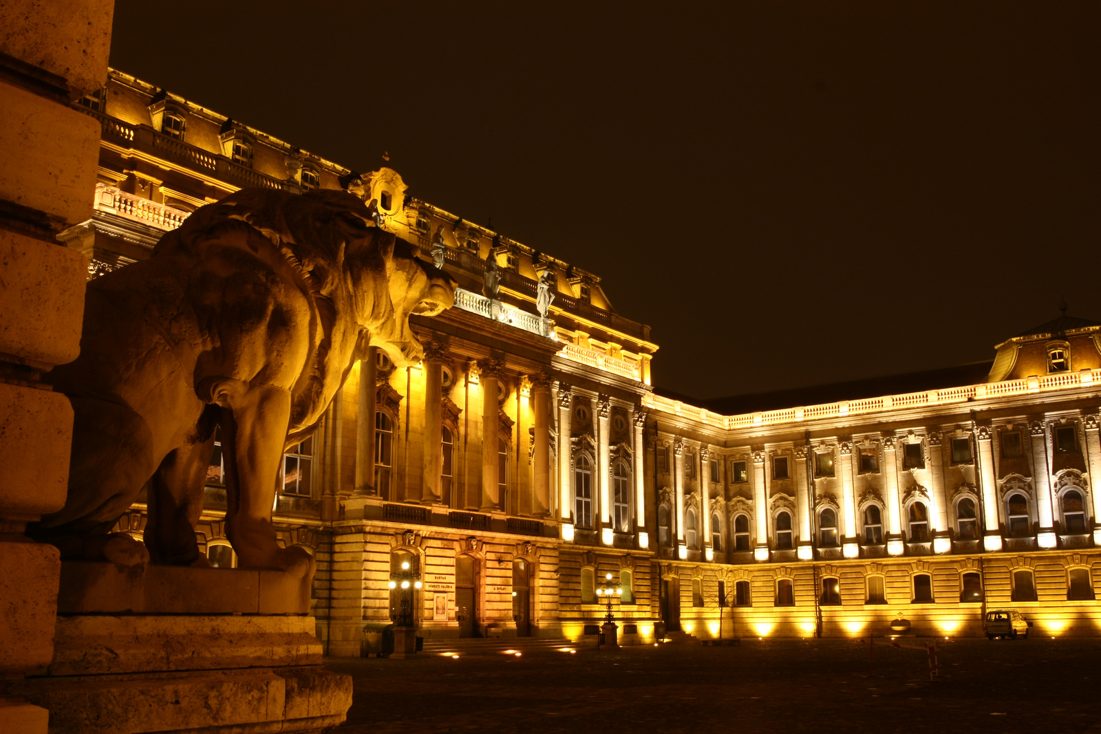 Volt Királyi palota (Budapest 1, Szent György tér 6.) This is a photo of a monument in Hungary, Identifier: 138